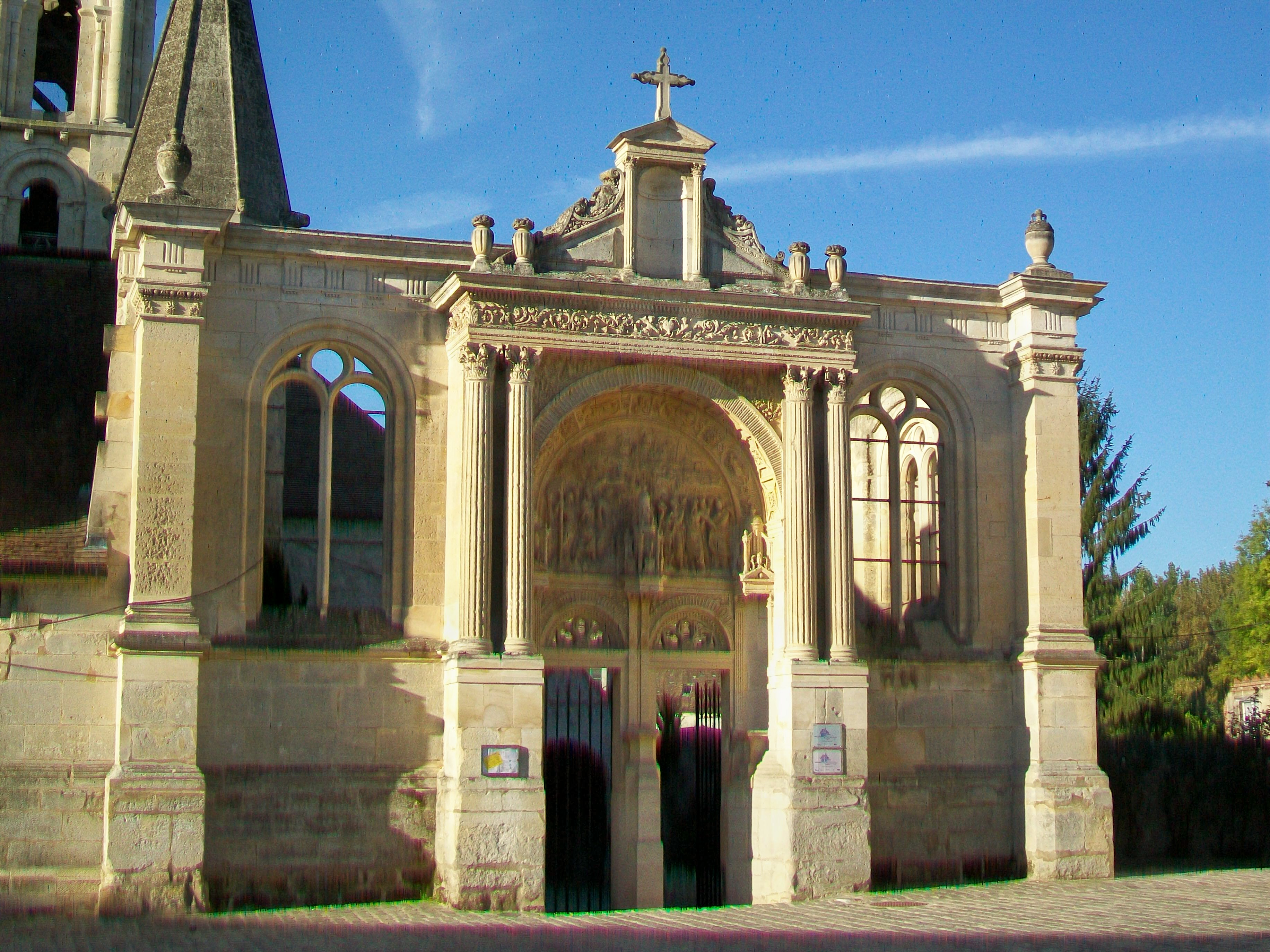 Le portail Renaissance pour l'extension inachevée.